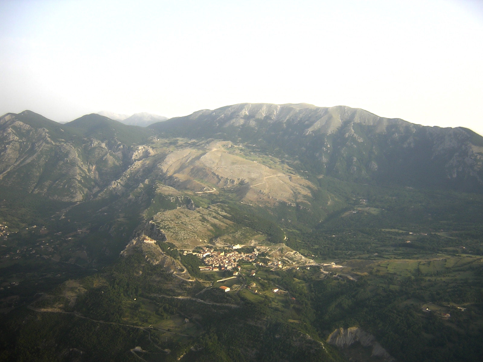 Fotografia in volo su Pietraroja